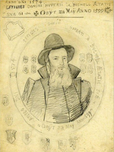 tekening van Grolman naar een schilderij uit 1574 met het portret van Hubert van Buchell (1513-1599), kanunnik van St. Marie te Utrecht